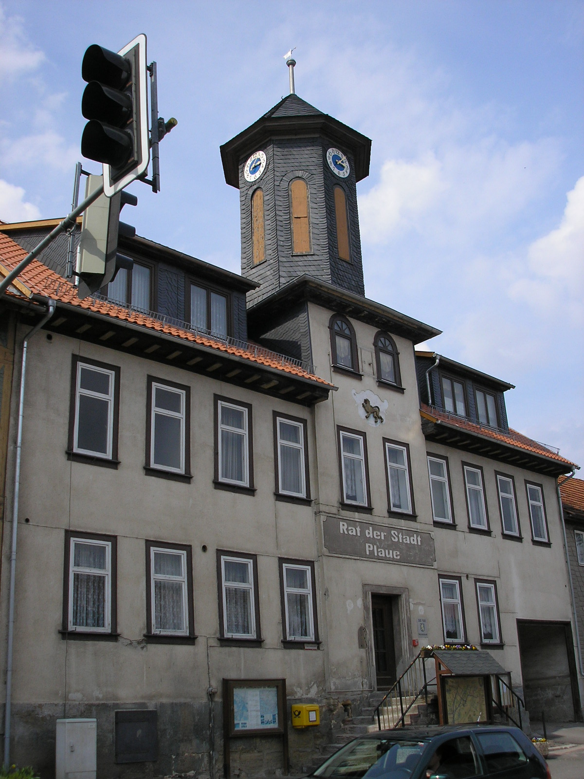 Rathaus von Plaue.